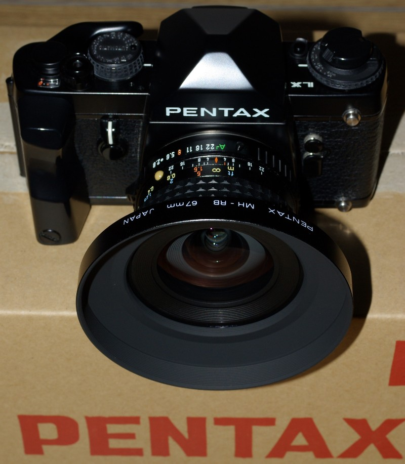 smc PENTAX-A 1:2.8 20mm。純正フード装着。